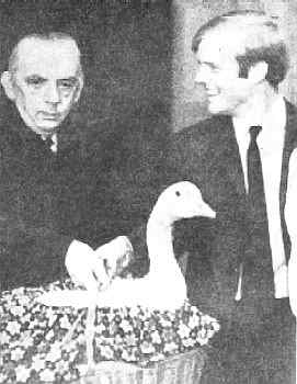 Profesor Mazur wręcza żywą gęś szwedzkiemu matematykowi za rozwiązanie problemu z Księgi Szkockiej Fotografia pochodzi z książki Kazimierza Kuratowskiego "Pół wieku matematyki polskiej 1920-1970" wydanej przez Książkę i Wiedzę w 1973 r. (bez zastrzeżonych praw autorskich).